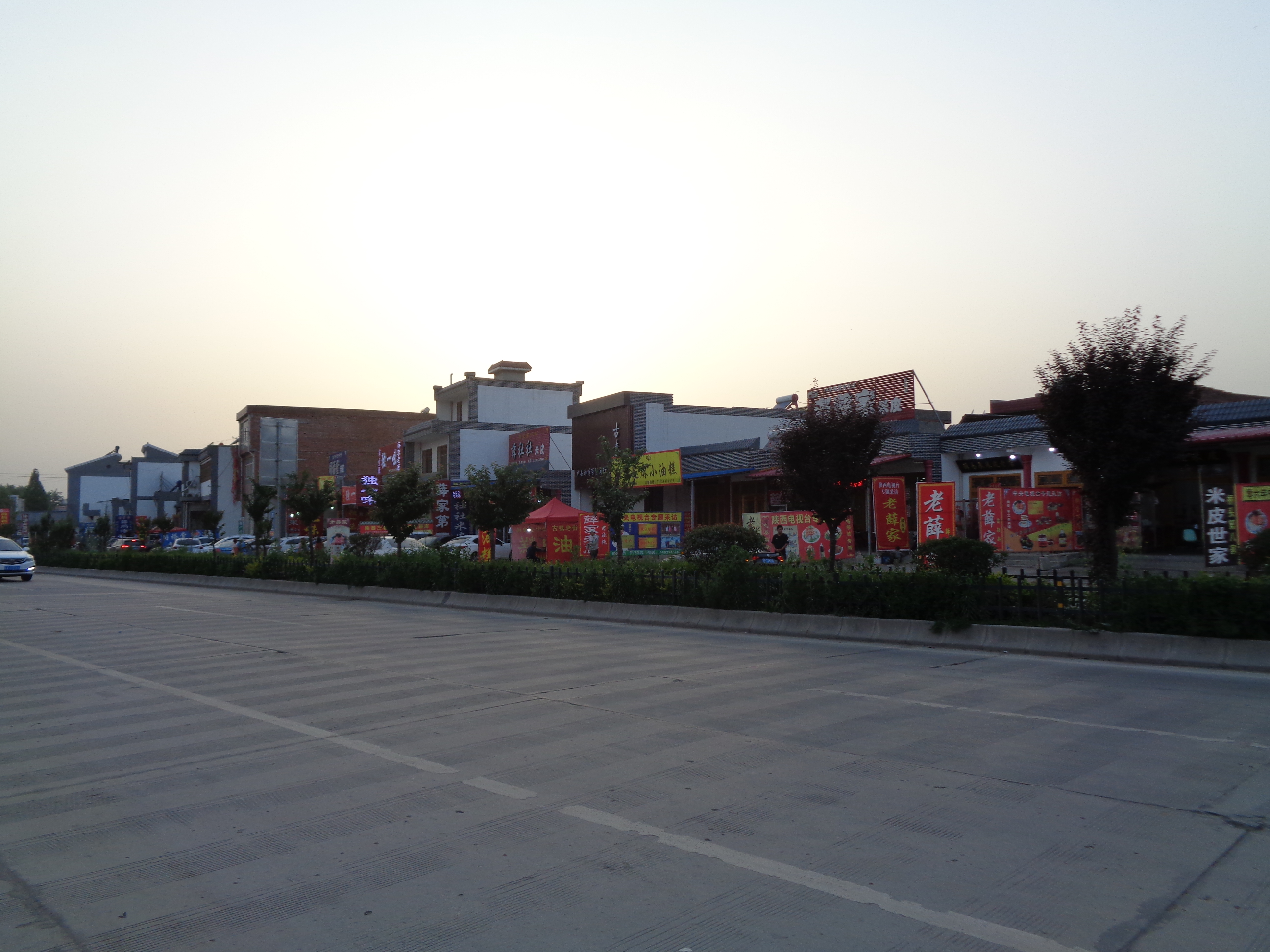 西安市鄠邑区秦都镇